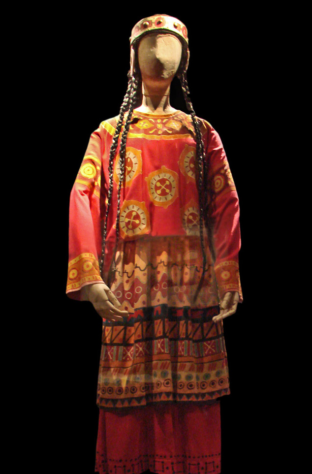 D'après Nicolas Roerich Costume pour une femme rouge dans le Sacre du printemps ballet de Vaslav Nijinsky Reprise à l'Opéra de Paris, 1991 Exposition Ballets russes Bibliothèque-musée de l'Opéra de Paris Dans l'article "Sacré Sacre !", les auteurs Sylvie Dancre et Philippe de Lustrac mettent en cause les références ethnologiques du peintre Nicolas Roerich, auteur des costumes et des décors du Sacre, créé en 1913. Celui-ci bénéficiait d'une réputation d'anthropologue compétent sur les pratiques et coutumes des anciens slaves et était le conseiller officiel des ballets russes à ce sujet. Selon eux, N. Roerich, un adepte de la théosophie, a tout inventé en s'inspirant de costumes folkloriques traditionnels et ne possédait aucune compétence scientifique. (Revue Danser, hors série, décembre 2009)